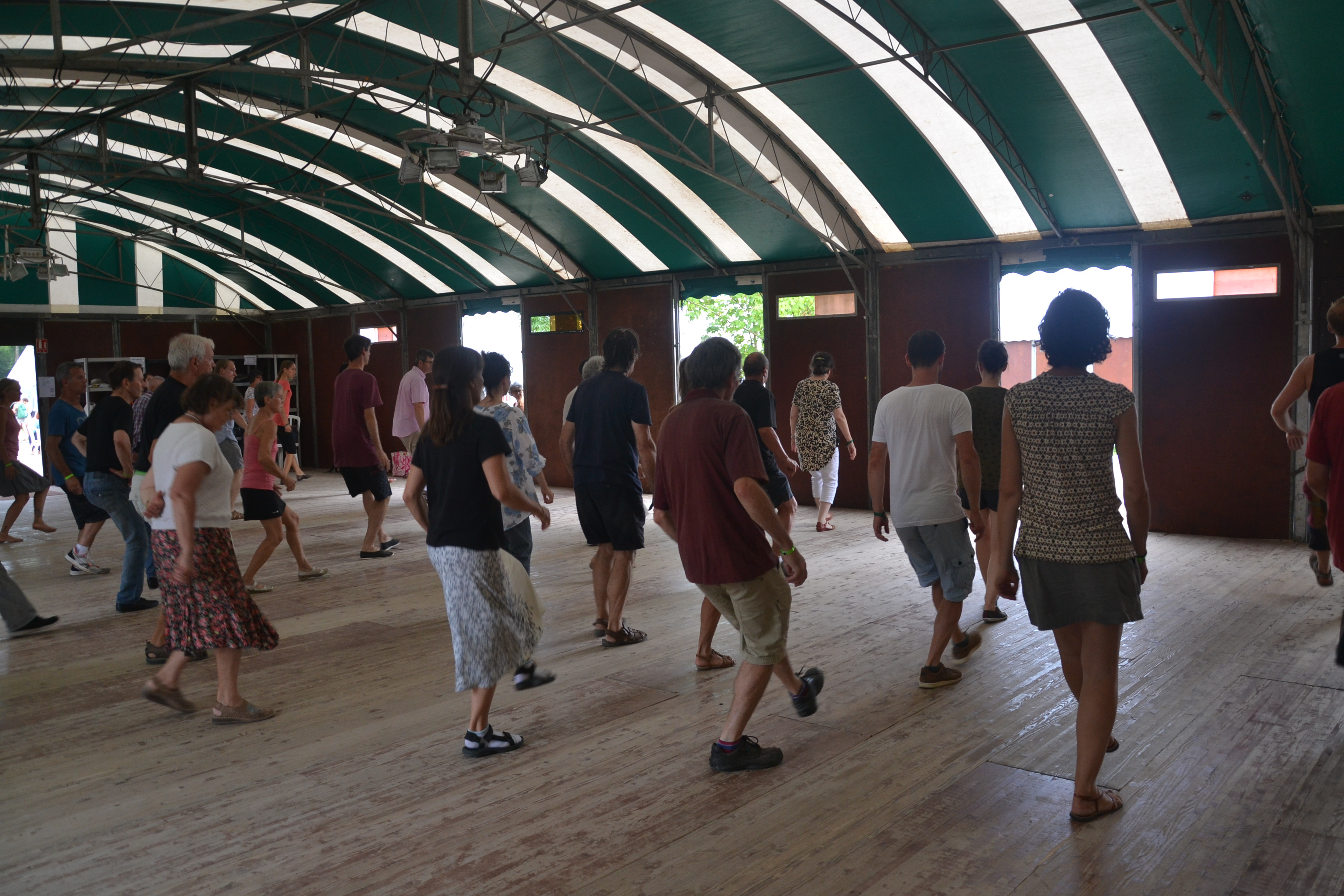 Stage de sautière (danse du Limousin) au Grand bal de l'Europe de Gennetines (Allier, France), en 2017.